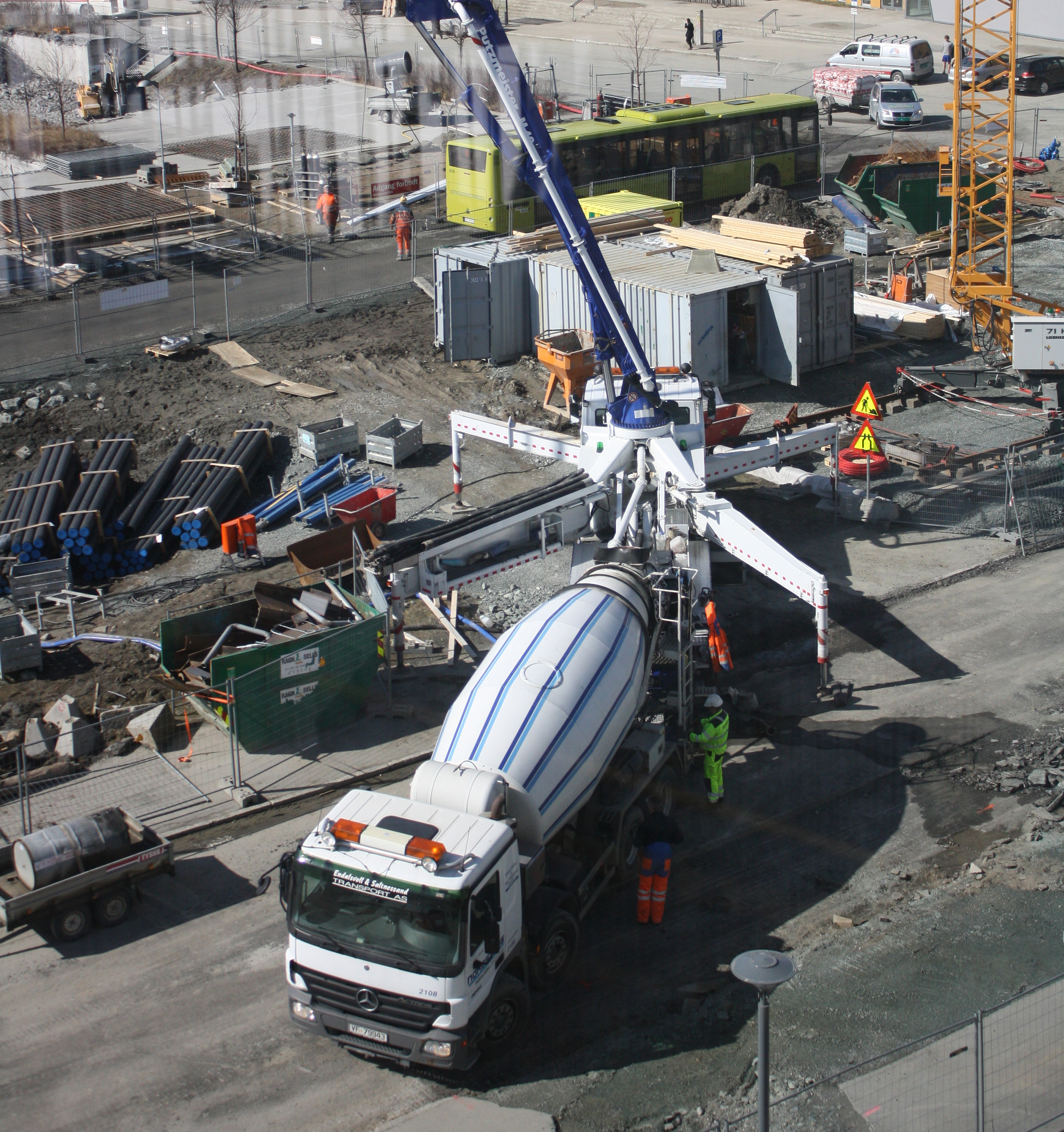 Anleggsarbeid på Brattøra